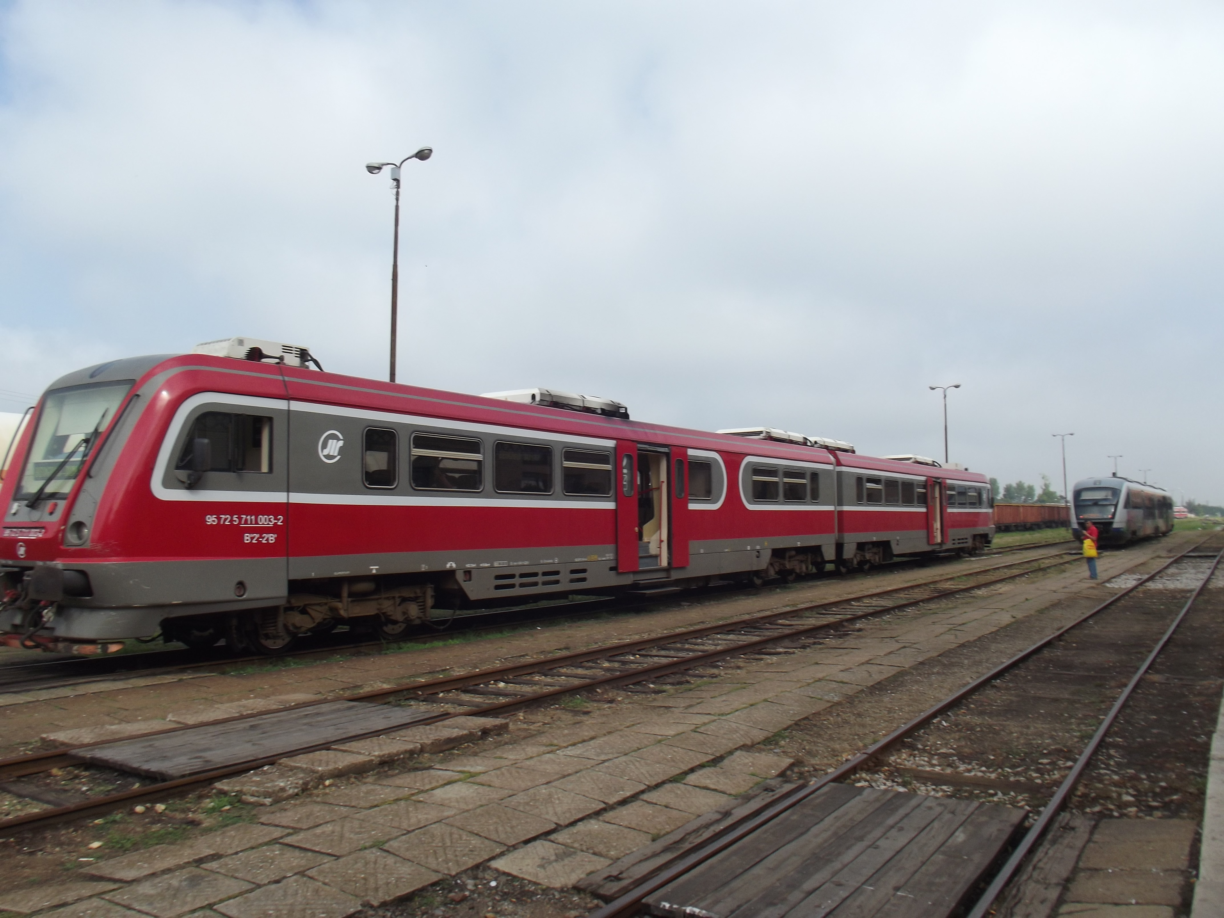 Aansluitende Servische trein in Vršac